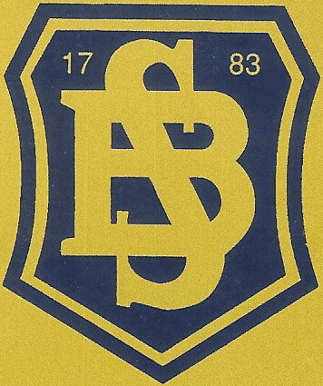 Emblème du lycée Saint-Benoît